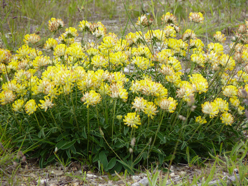 Anthyllis vulneraria